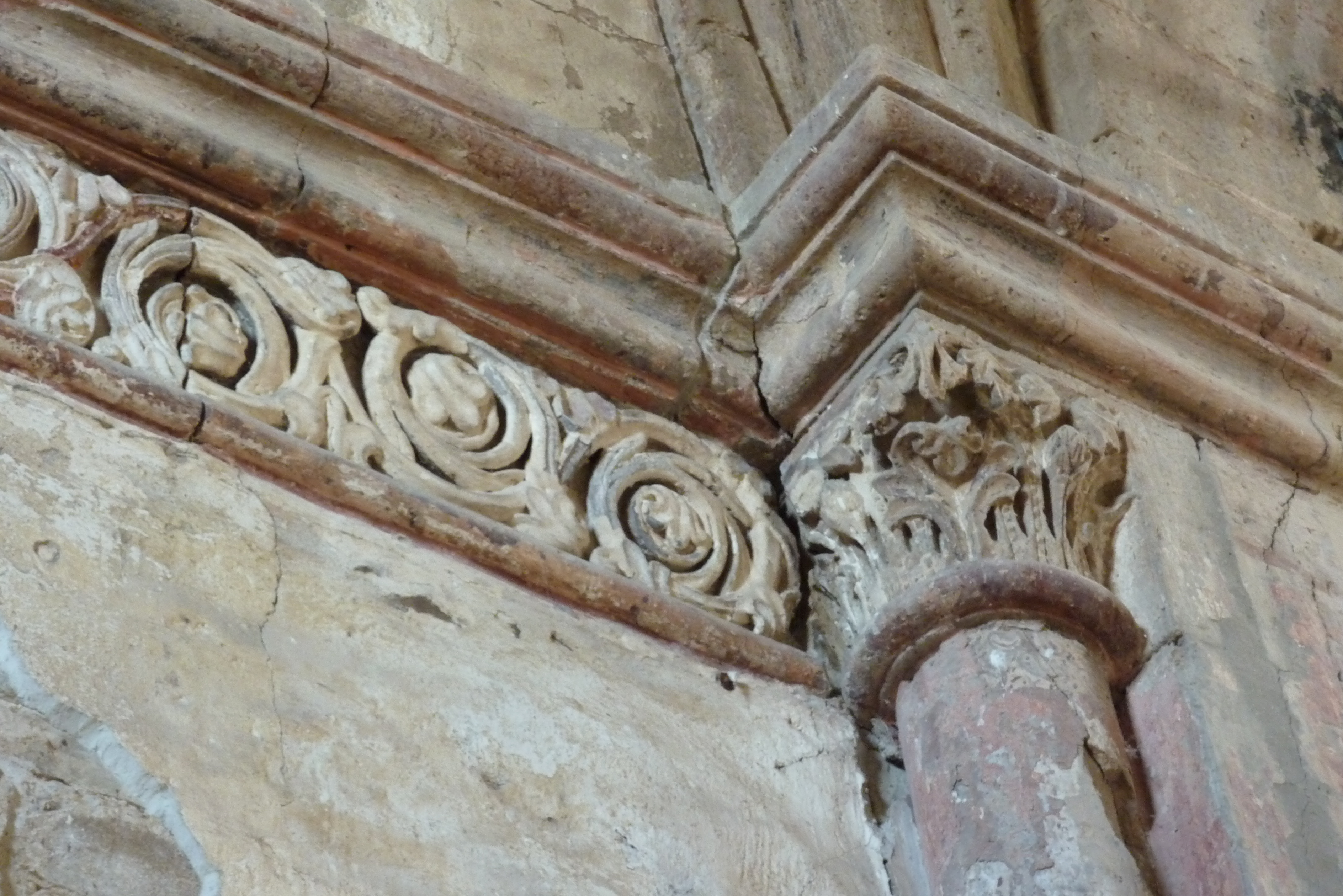 Propstei Buchholz, Kirche Sankt Servatius, Fries und Kapitell